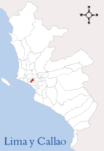 Localización del Distrito de Jesús María Imagen elaborada por --Edgardo Reyes 21:08 9 mar, 2005 (CET) Categoría:Mapas del Perú (imagen)